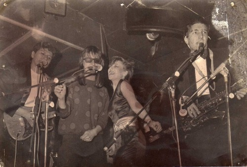 Comida China tocando en la disco Experiment. De izquierda a derecha: Rafael Bini, Hilda Lizarazu, Divina Gloria y Willy Crook. Foto circa 1984.